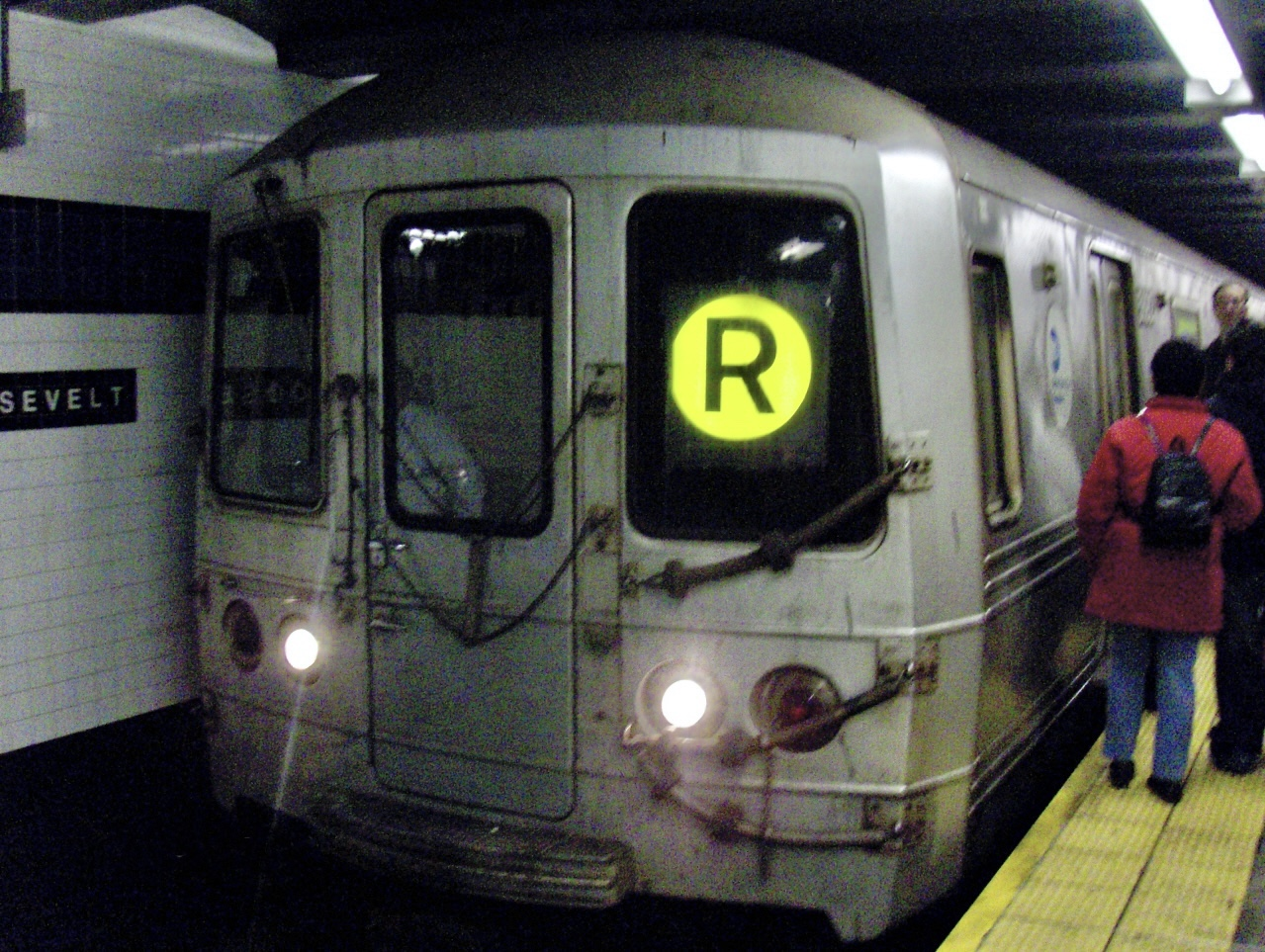 Tren del servicio R del metro de Nueva York